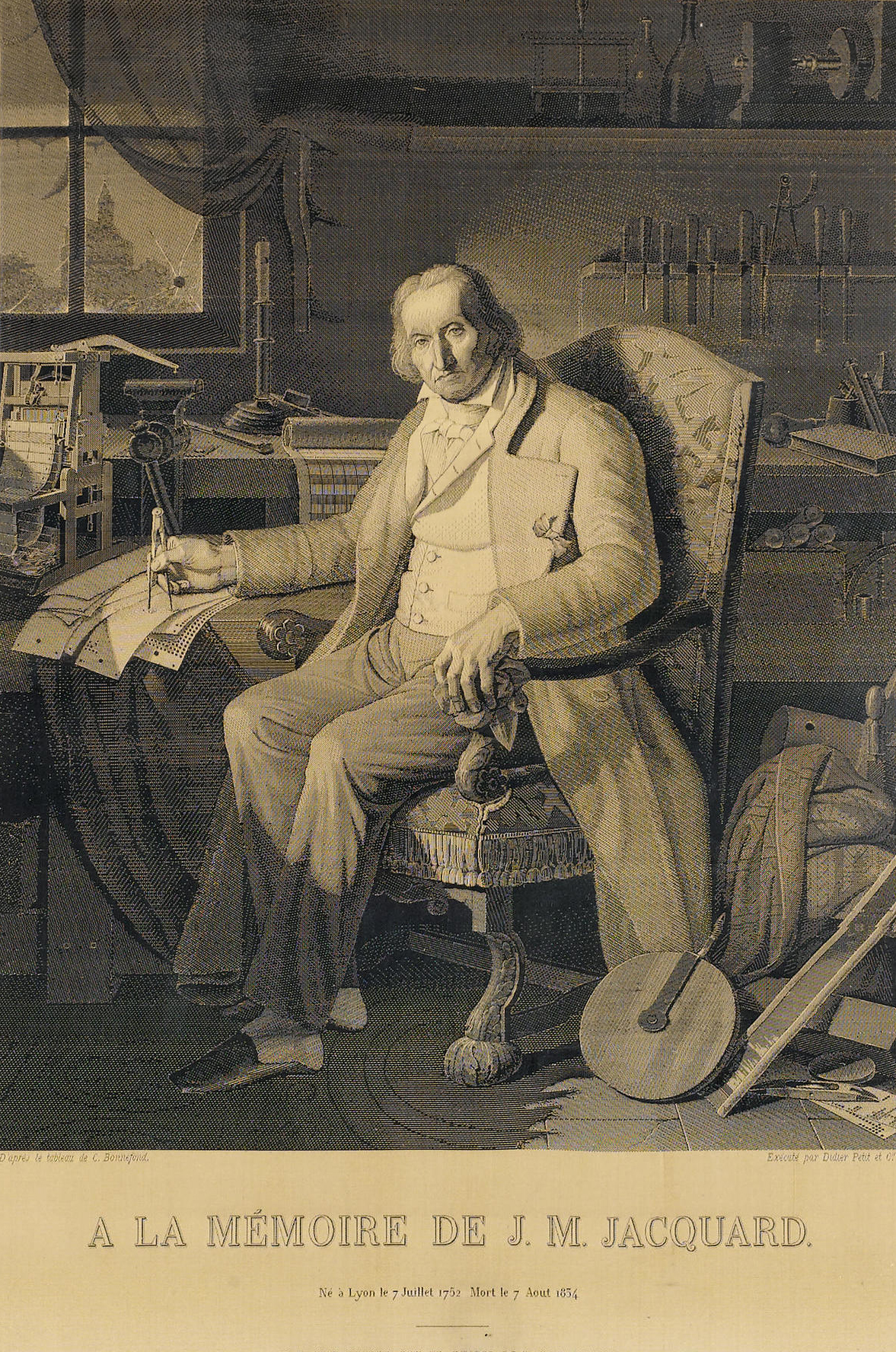 Portrait en soie tissée de Jacquard